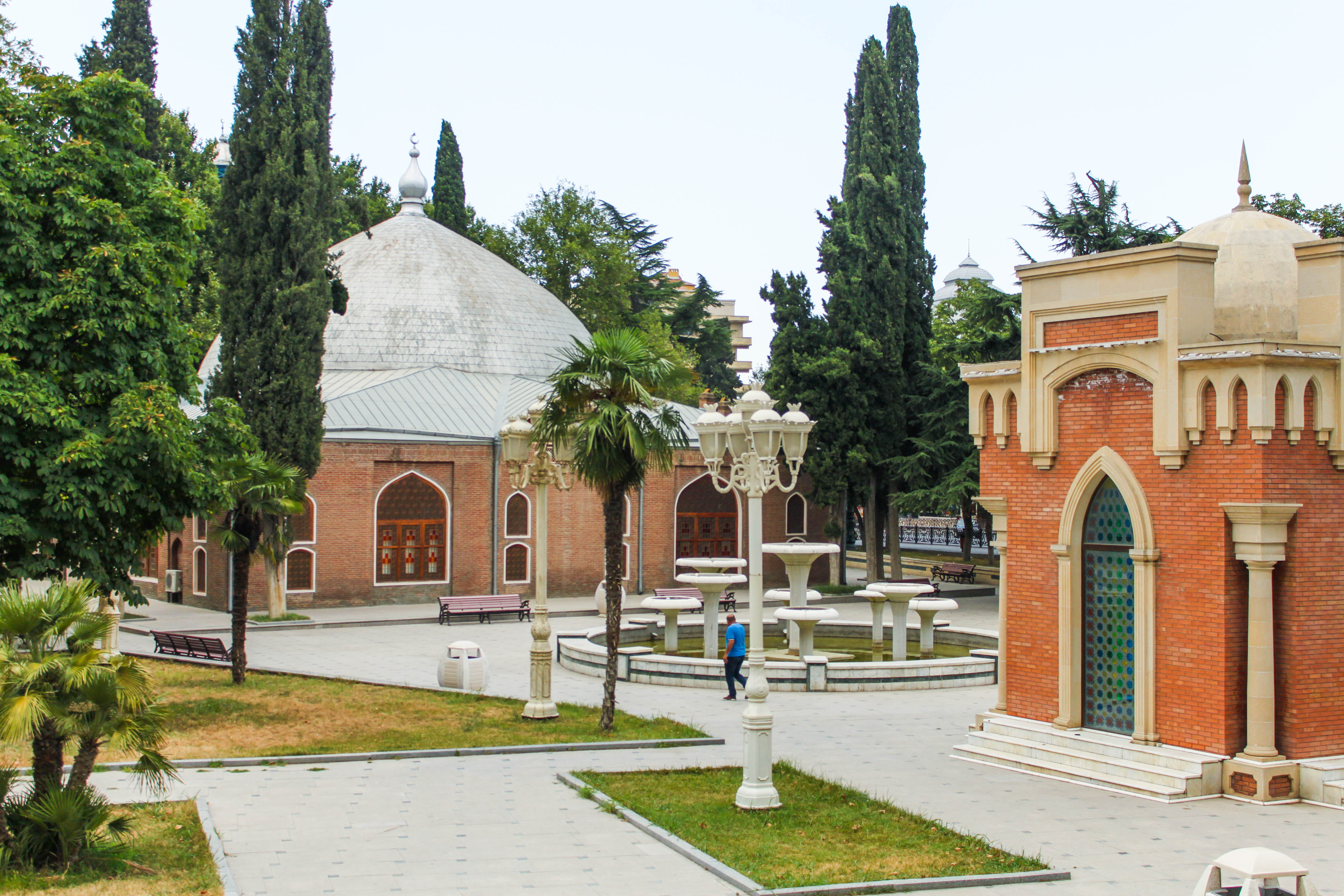 Şah Abbas meydanı